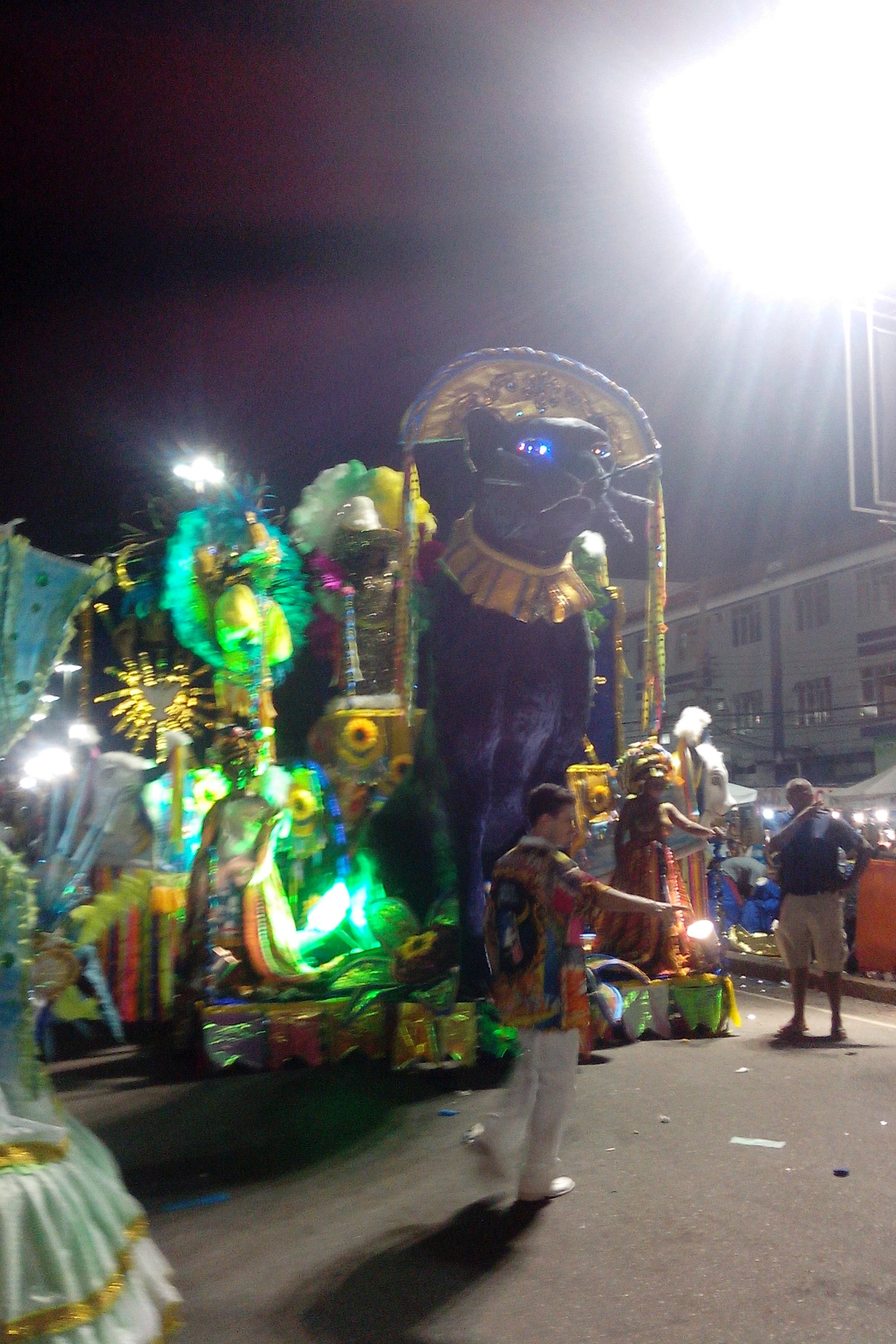 Desfile do Gato de Bonsucesso, em 2017.